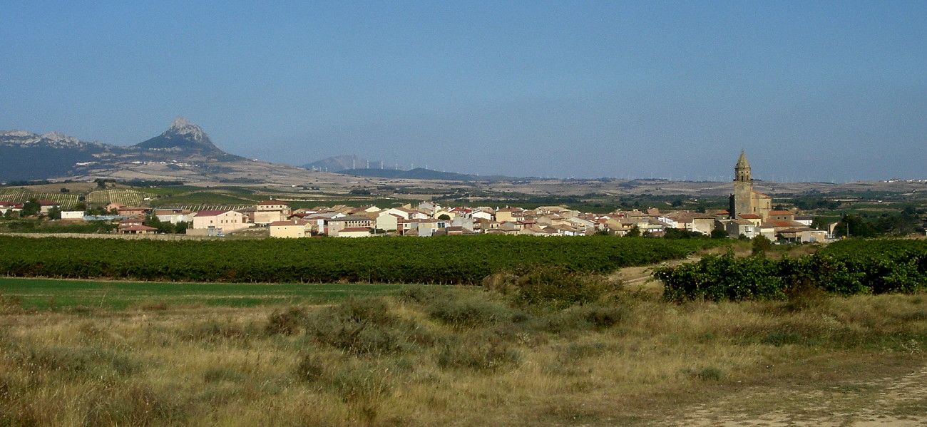 Bilar herria eta Lapoblacion mendia (Araba)